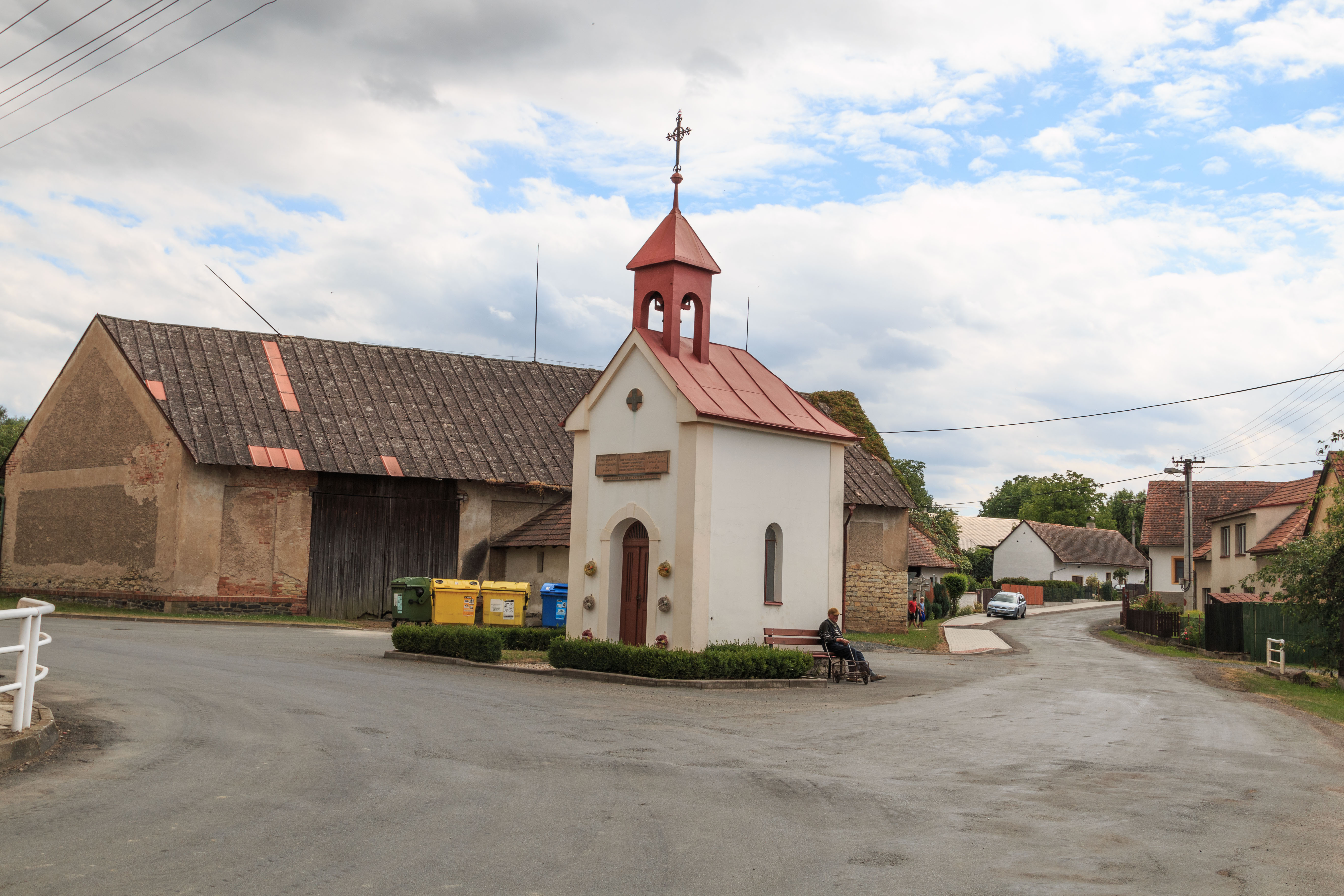 Kněžice u Ronova nad Doubravou kaple